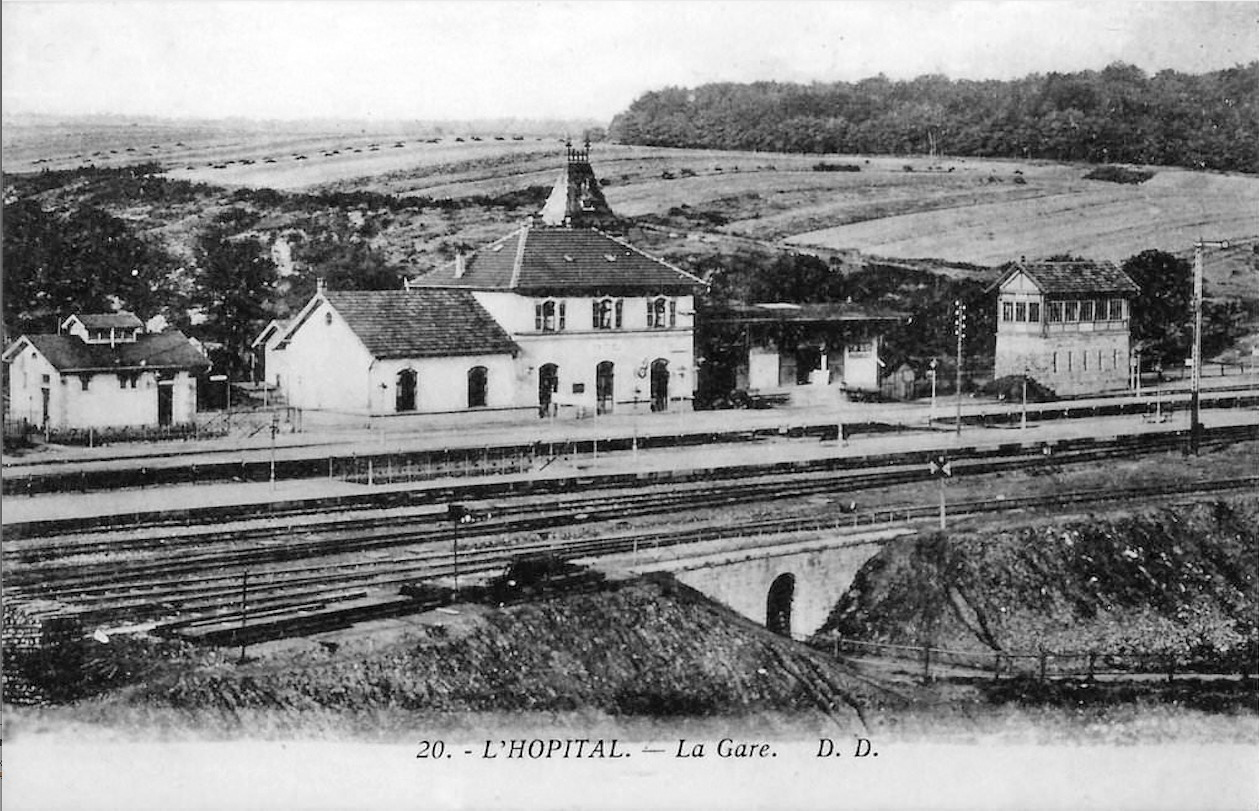 La gare de L'Hôpital de la ligne de Haguenau à Hargarten - Falck, située sur le territoire de la commune de L'Hôpital dans le département de la Moselle. Gare construite par la Direction générale impériale des chemins de fer d'Alsace-Lorraine (EL) quand la Moselle était allemande.